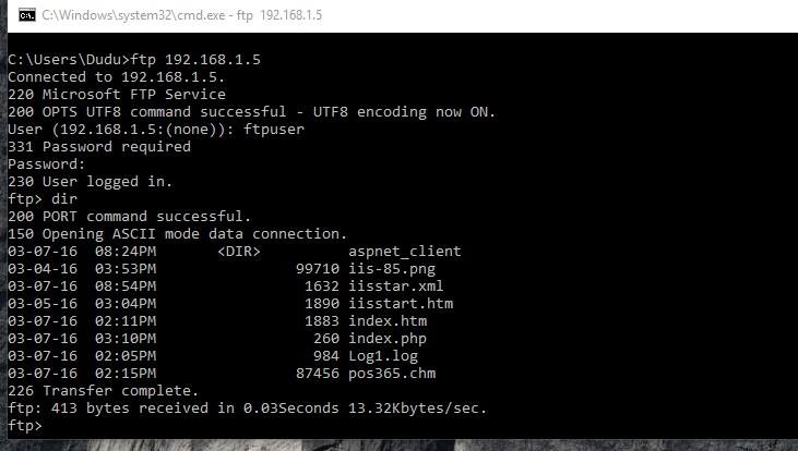 Монгол: FTP